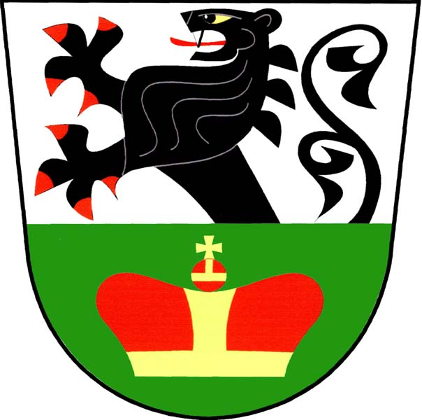 Znak obce Lukovany